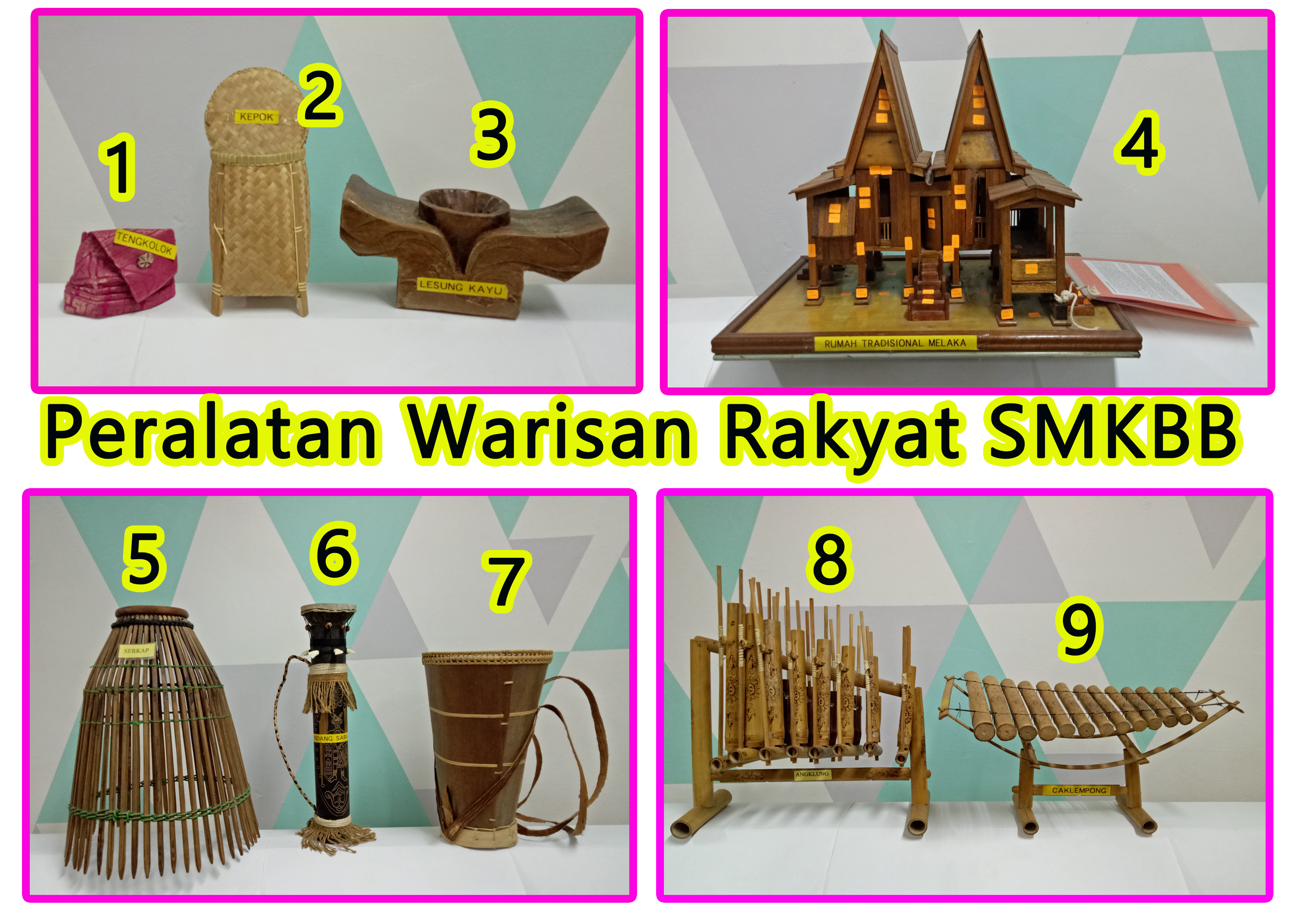 Peralatan Warisan Rakyat SMKBBB